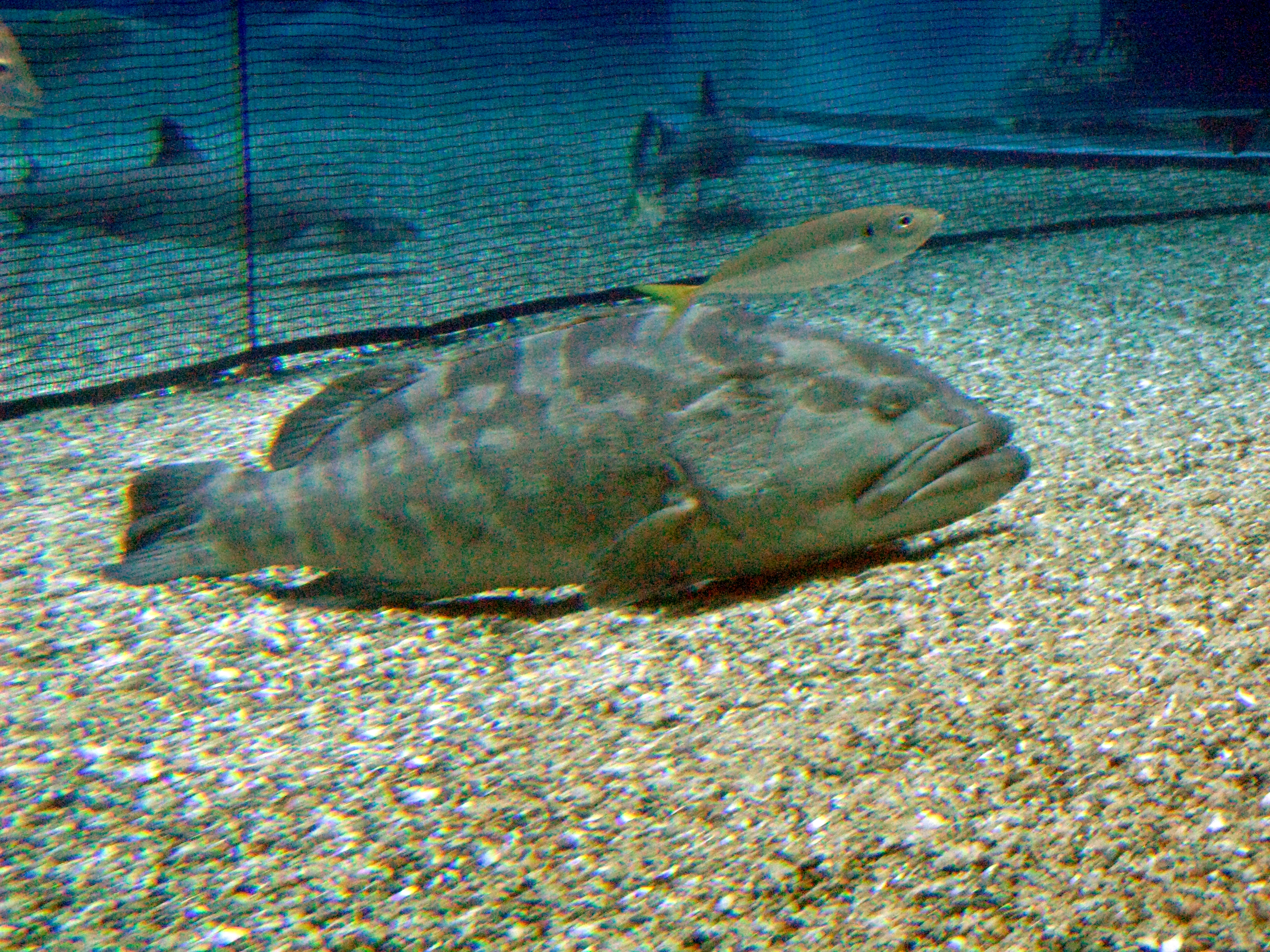 Scientific name Epinephelus bruneus